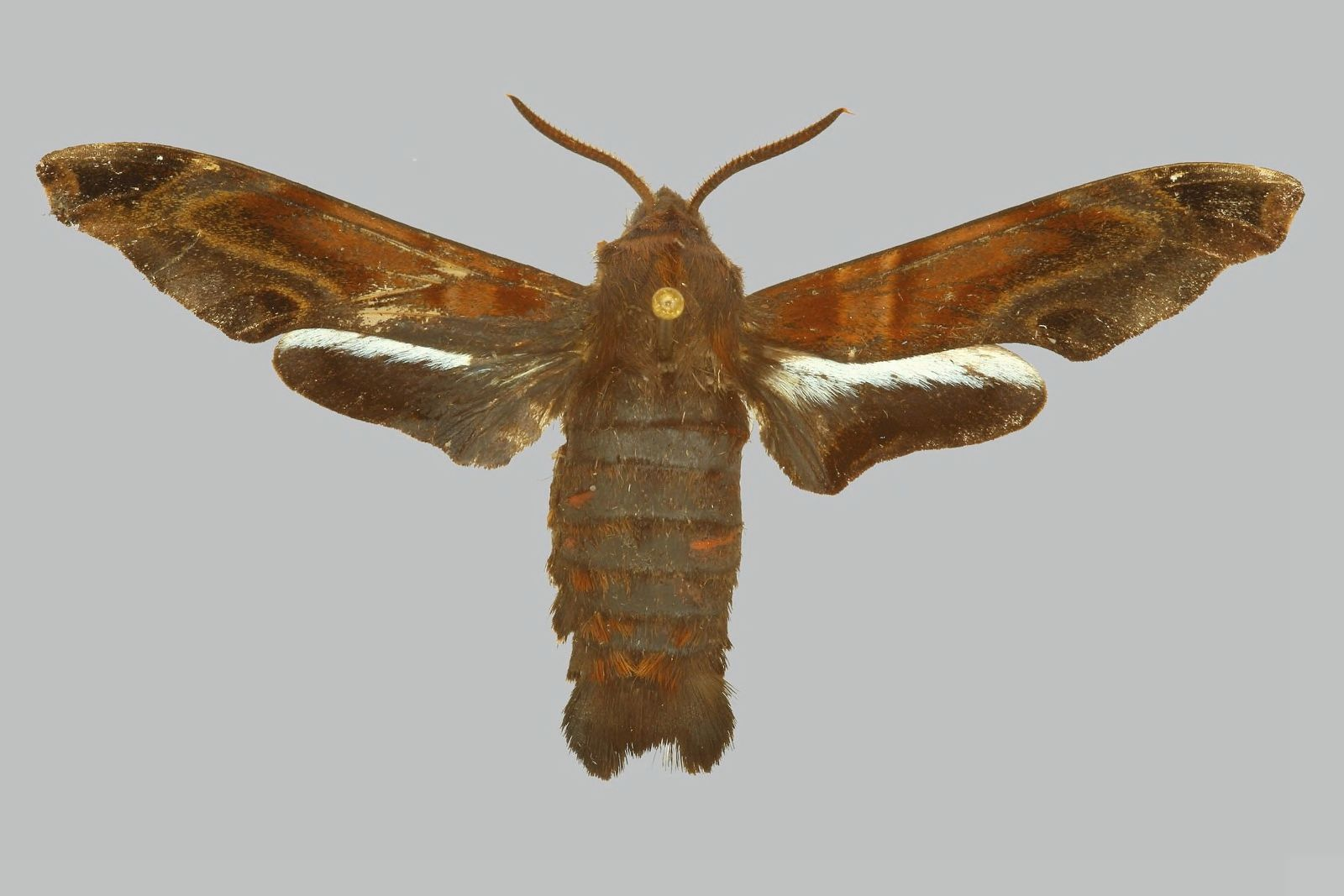 Afrosataspes galleyi, male, upperside. Central African Republic, Banqui